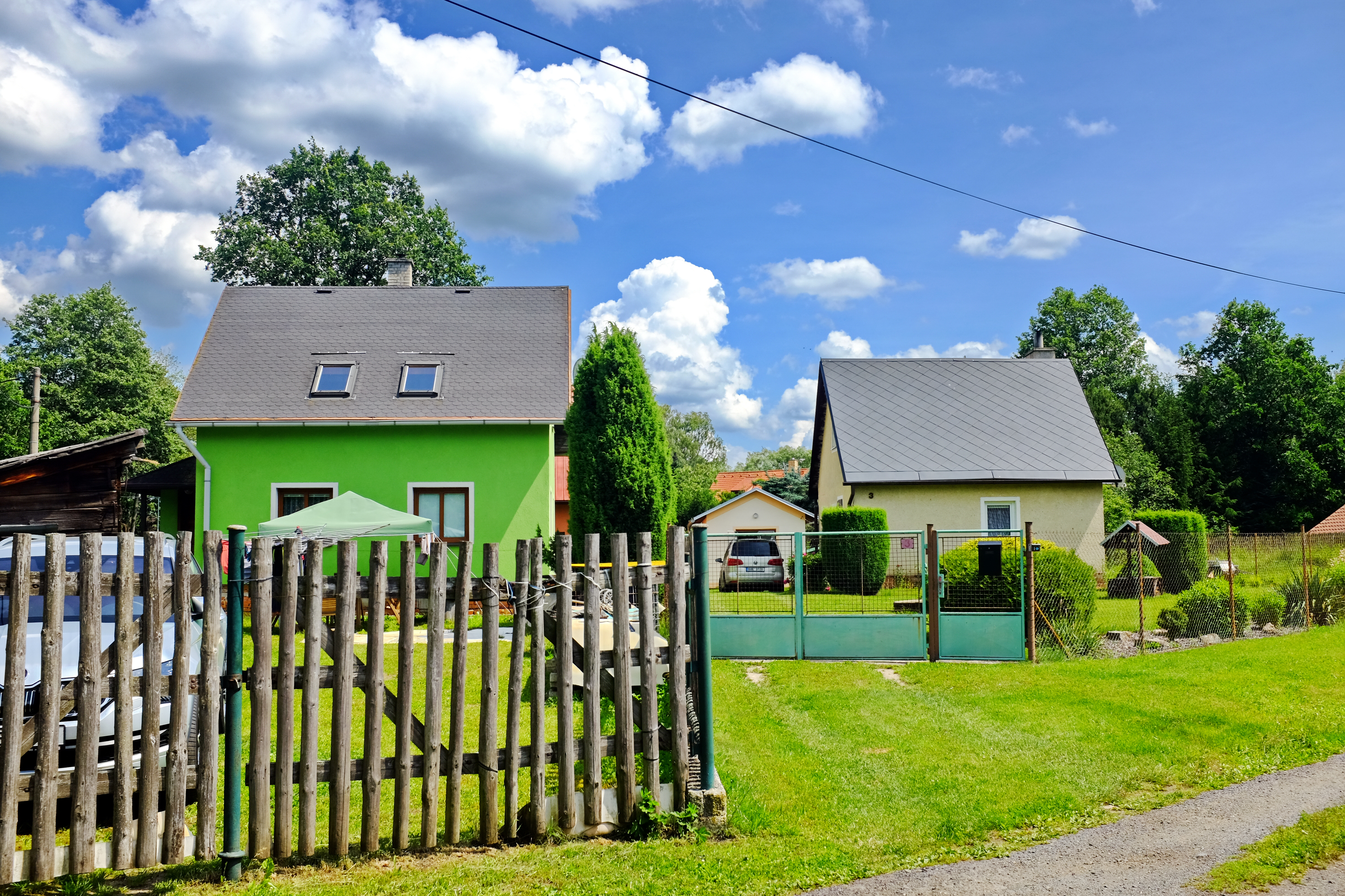 Stebnice, část obce Lipová, okres Cheb